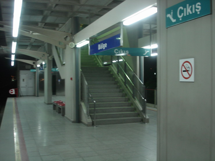 İzmir Metrosu Bölge Durağı.